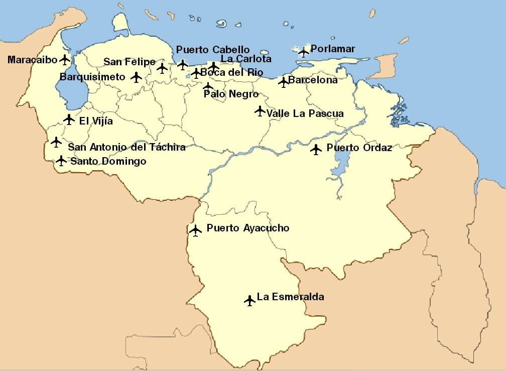 Localizacion de bases aereas venezolanas